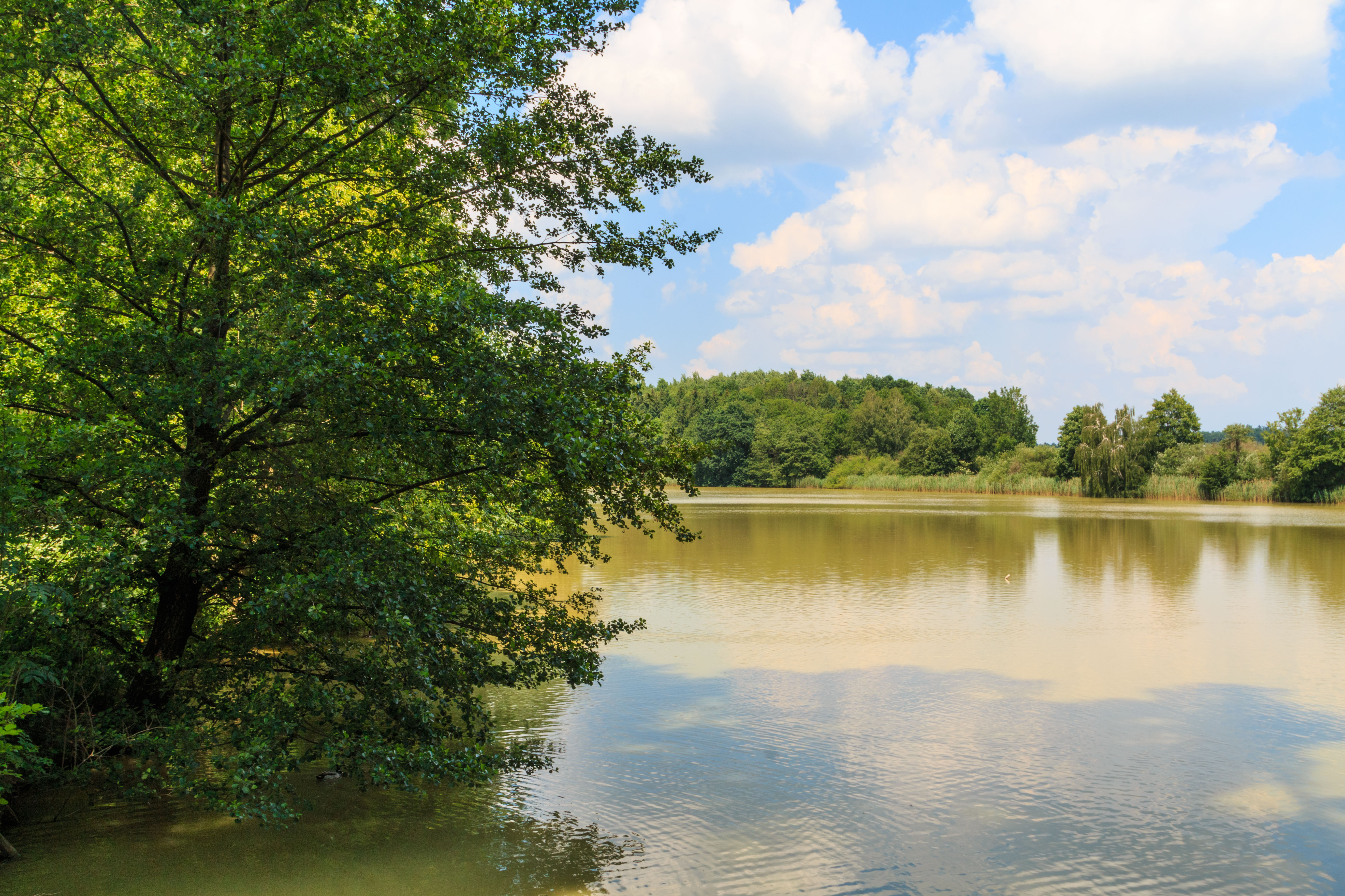 Rybník Necky u Černíkovic